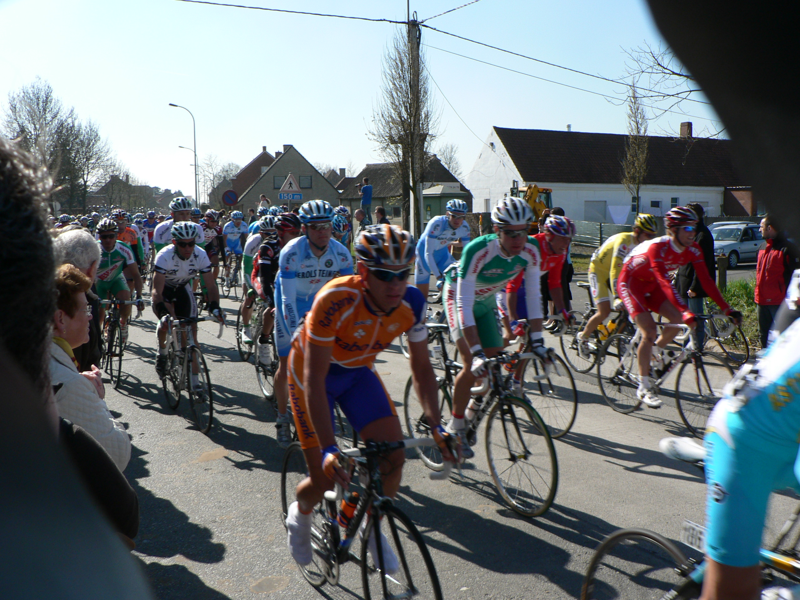 Ronde van Vlaanderen cycling event 4 april 2007, Deerlijk, Flanders, Belgium